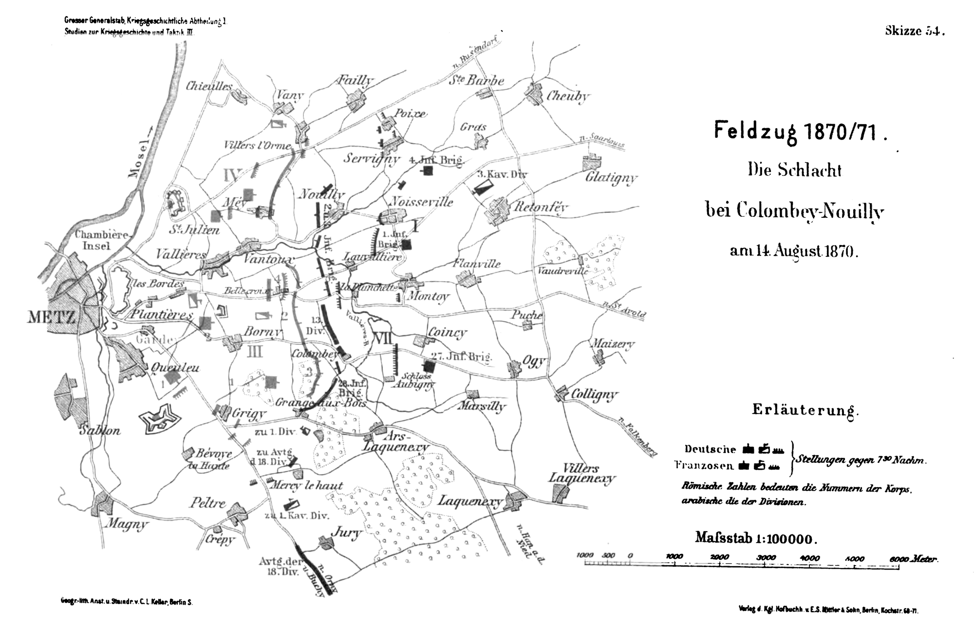 Taktische Karte, Schlacht bei Colombey-Nouilly